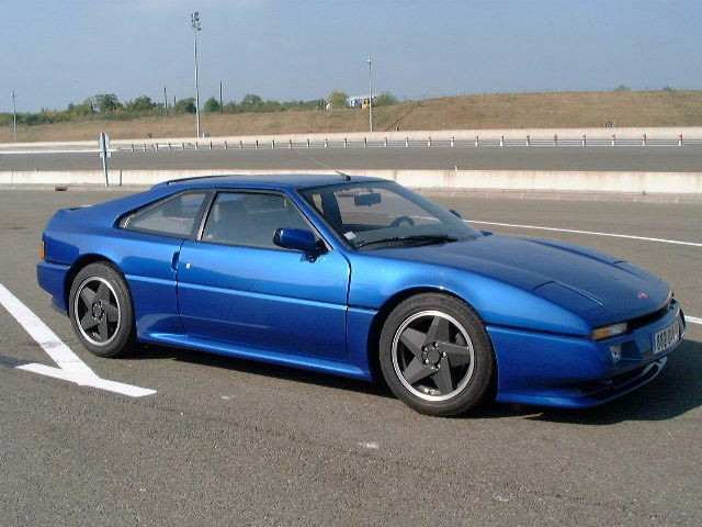 Venturi 260 Atlantique French sport car